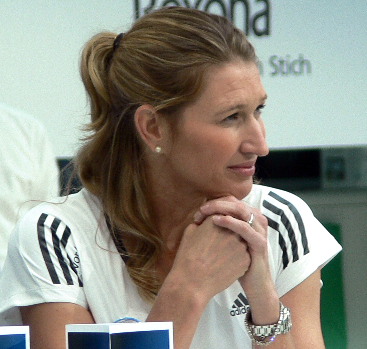 Steffi Graf während eines Charity-Tennis-Turniers für Rexona